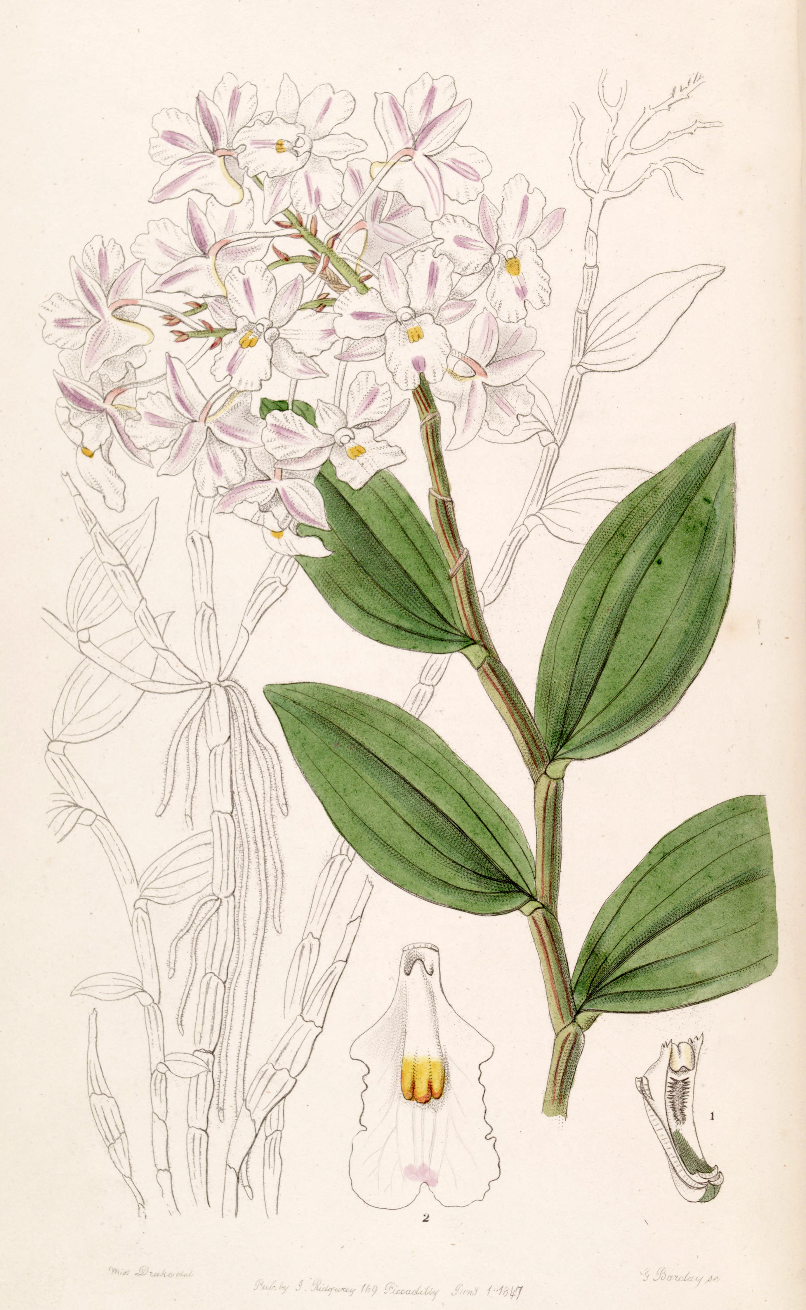 Dendrobium mutabile (as syn. Dendrobium triadenium)